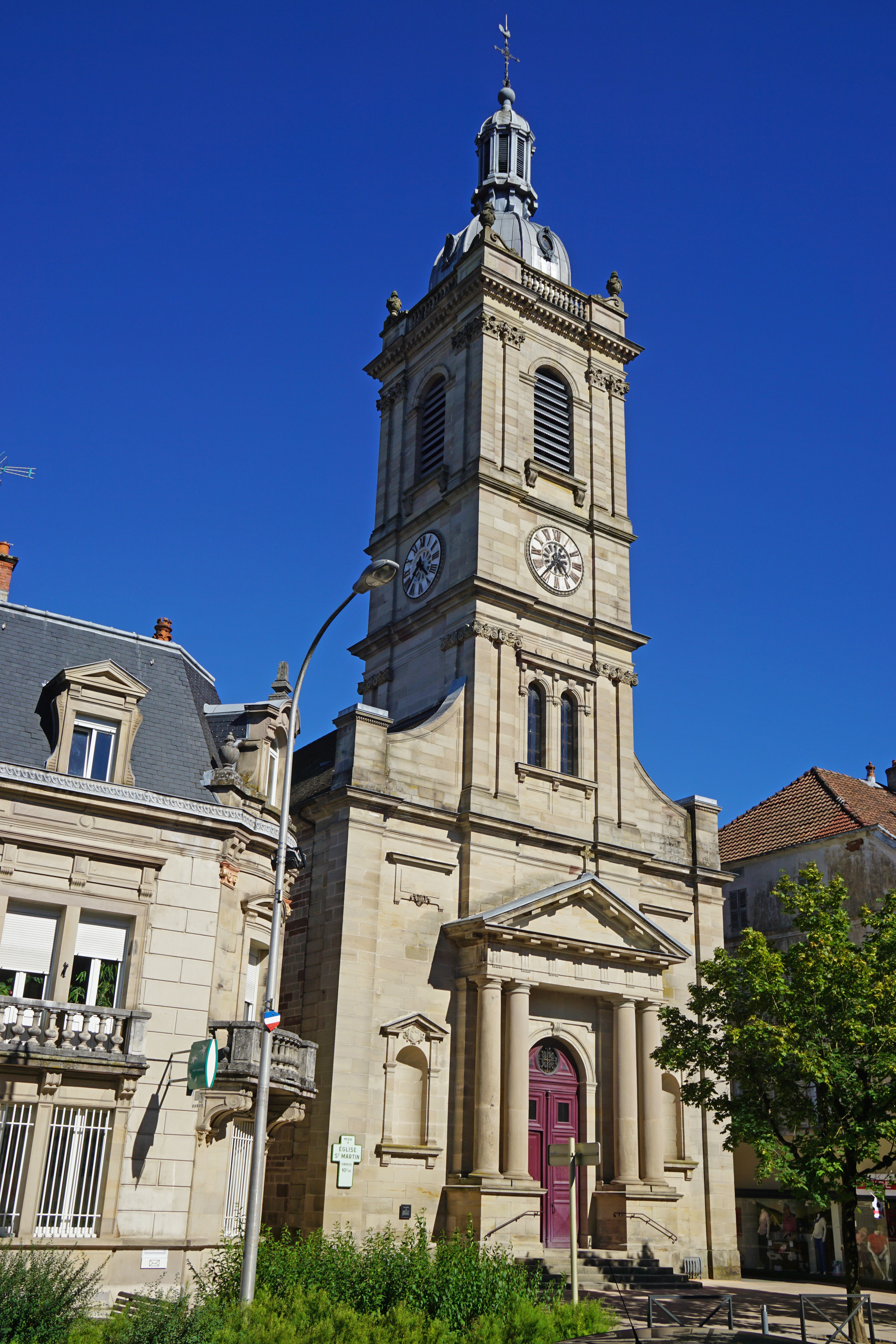 Église Saint-Martin de Lure.